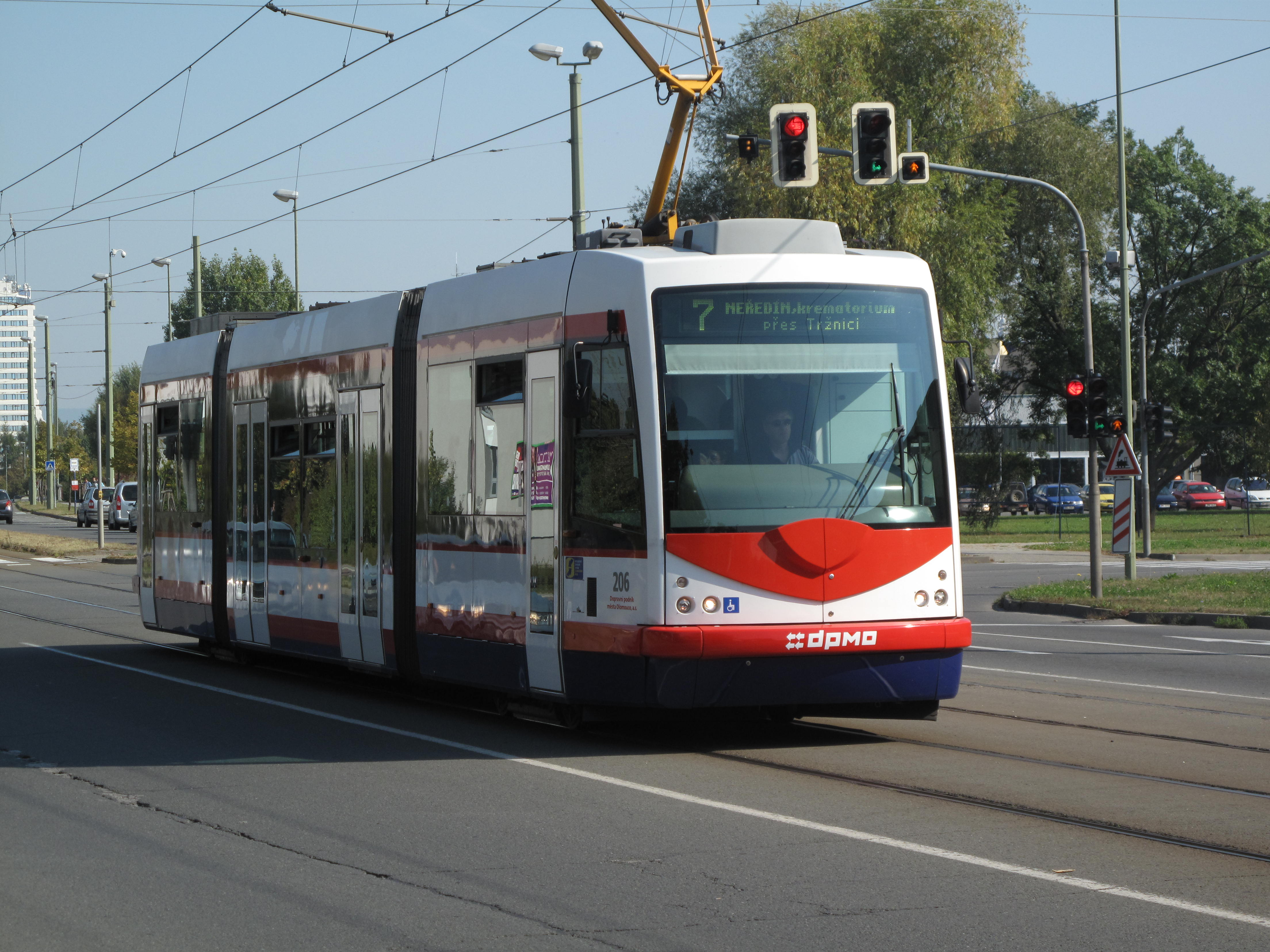 Olomouc